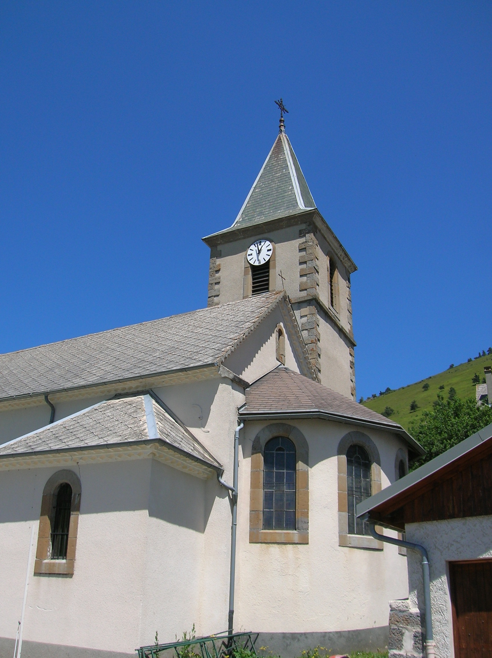 Sainte-Luce, Isère, France.